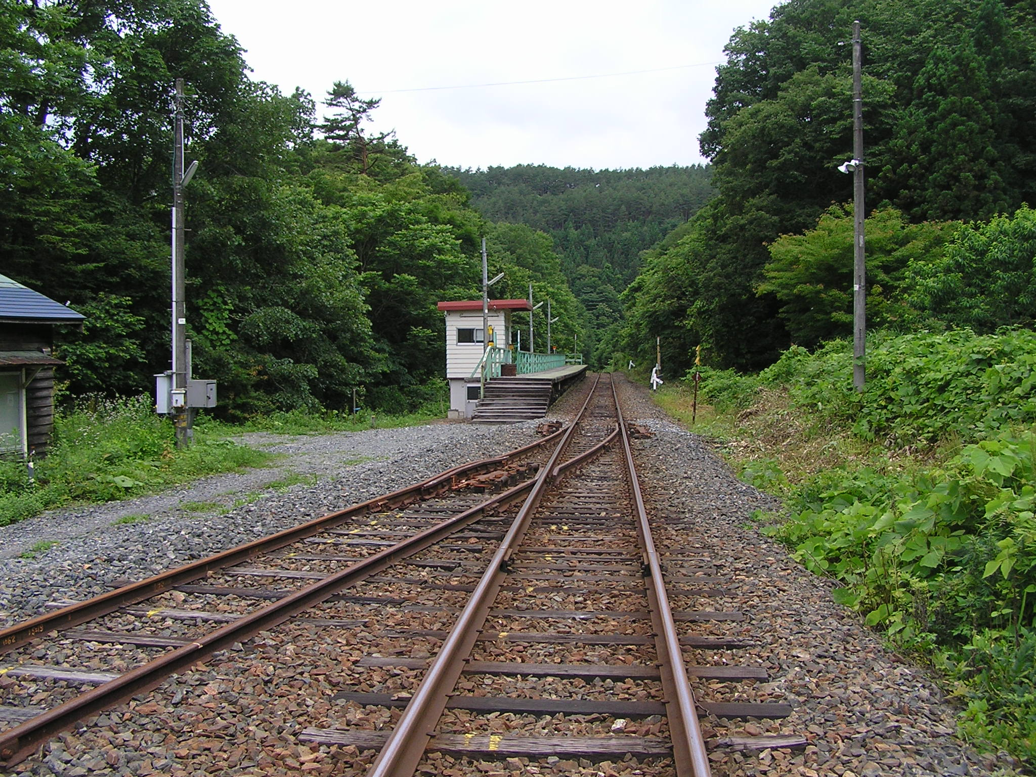 Ōshida Station, Morioka, Iwate, Japan